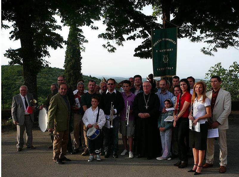 Visita Pastorale Vescovo Gualtiero Bassetti 2008 a Farnetella (Siena)